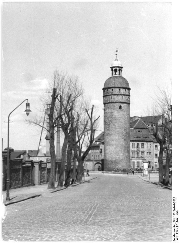 Görlitz, Turm Zentralbild Ihlau Wjtk-Ho. 9 Motive 5.5.1954 Görlitz - Großstadt an der Oder-Neiße-Friedensgrenze Görlitz wird zu Recht die "Stadt der Türme" genannt.Es ist eine alte Stadt mit vielen historischen Bauten. Am 7. Mai 1954 wird diese Stadt Etappenziel der VII. Internationalen Friedensfahrt sein. Der Schlagbaum an der gemeinsamen Grenze Volkspolens und der Deutschen Demokratischen Republik ist an diesem Tage hochgezogen. Die Fahrer des Friedens betreten in Görlitz den Boden des neuen Deutschlands. UBz: Turm an der alten Stadtmauer, von der Teile noch gut erhalten sind.